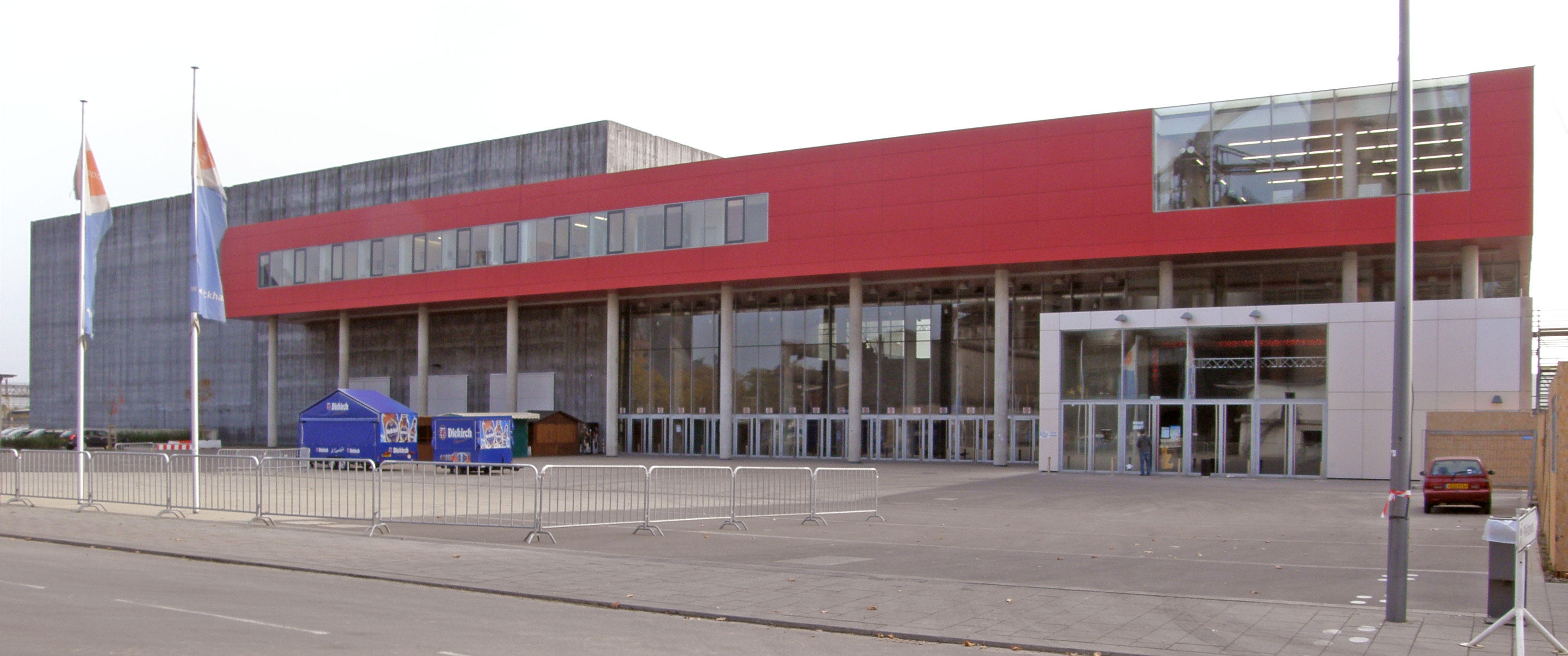 Rockhal vu vier.